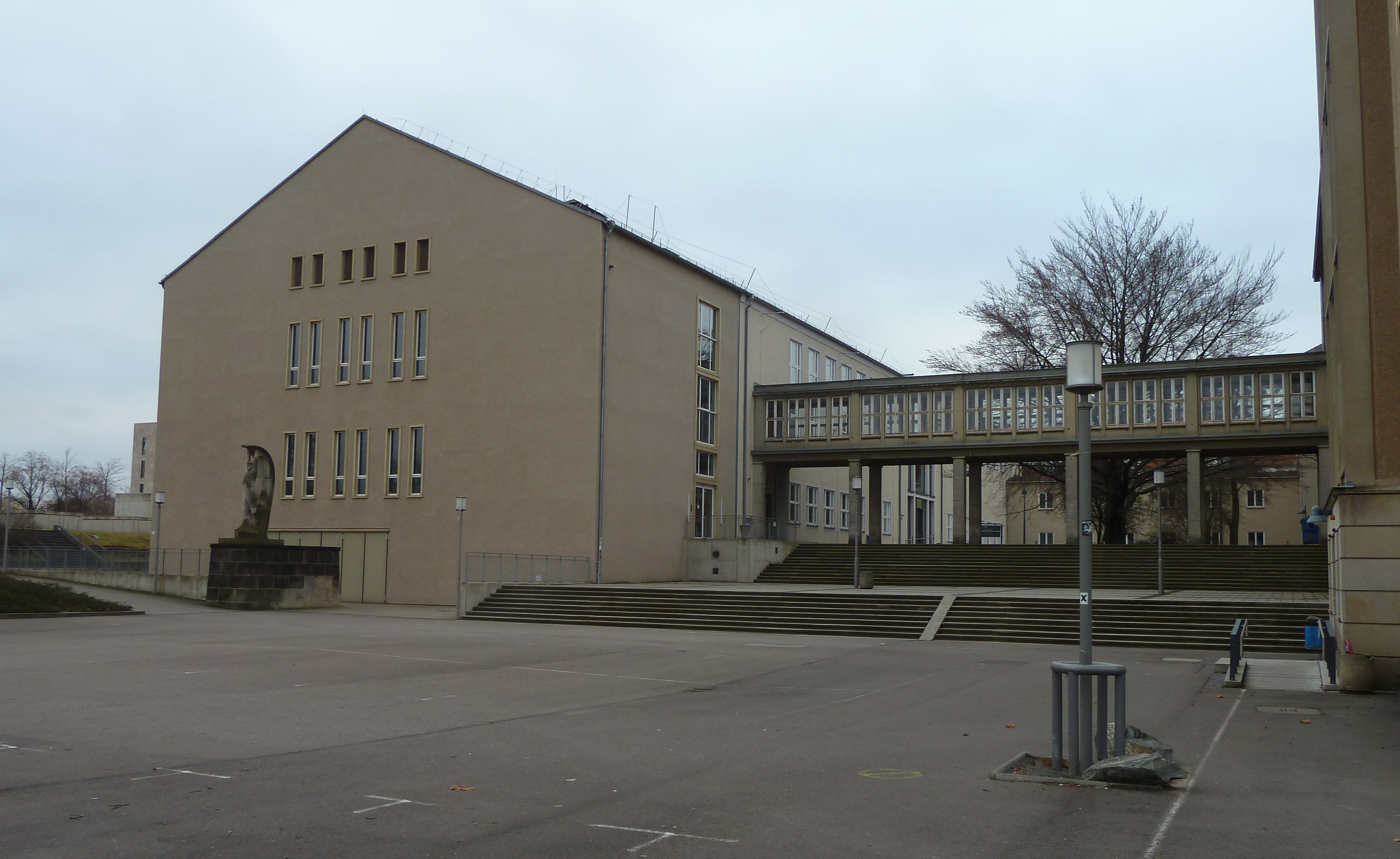 Vorplatz des Trefftz-Baus der TU Dresden.